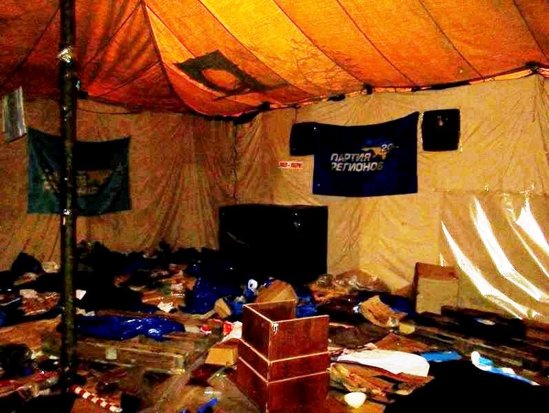 20.02.14. Маріїнський Парк. Табіт"тітушок". В середині палатки.